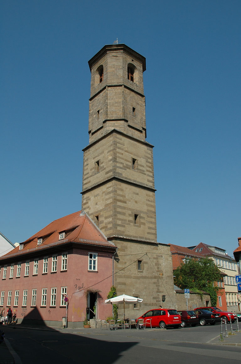 Paulsturm (errichtet zwischen 1465 und 1468) in der Paulsstraße in Erfurt